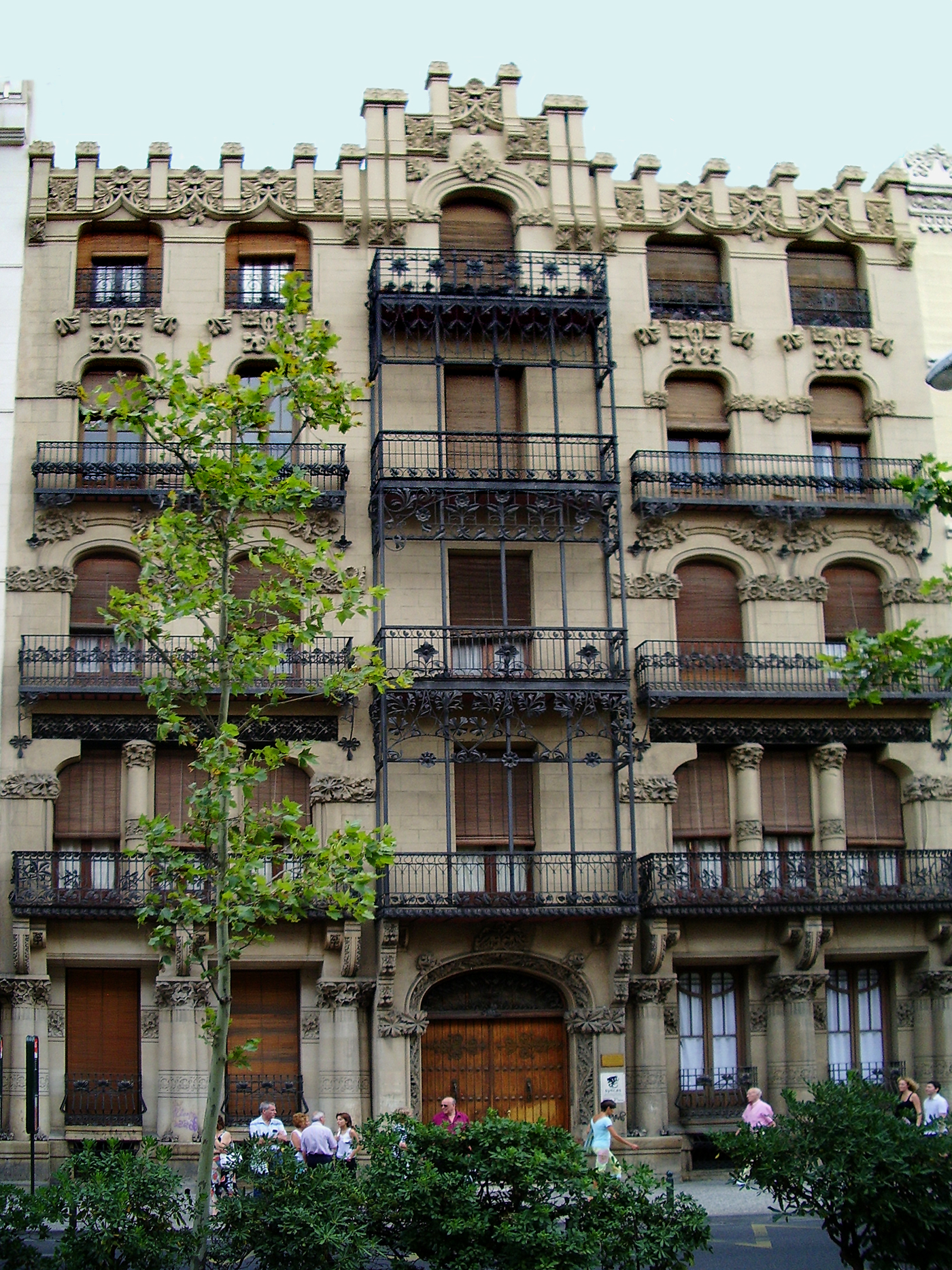 Edificio modernista llamado "Casa Juncosa" del Paseo de Sagasta nº 11 (Zaragoza, España). Arquitecto: José de Yarza Echenique. Año: 1903.